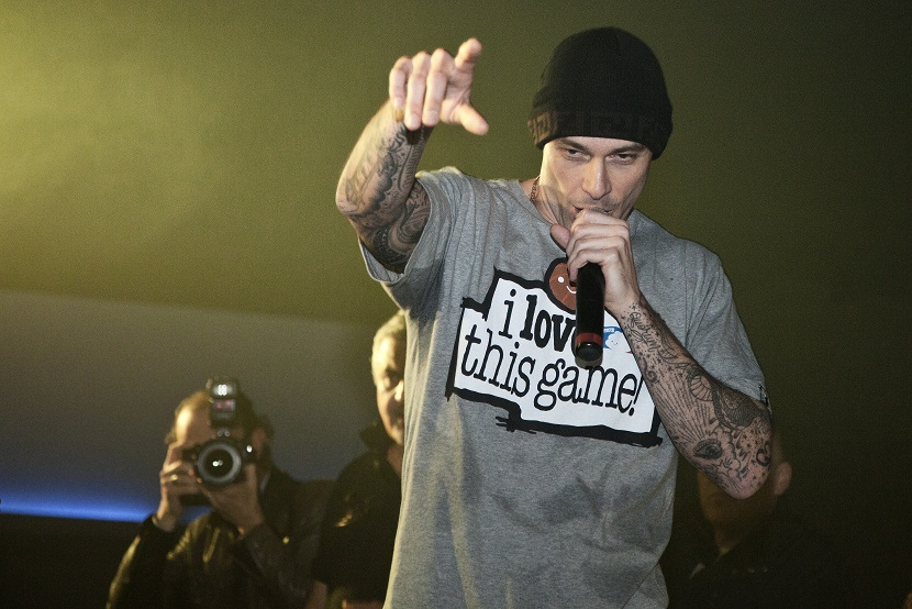 Fabri Fibra @ Altromondo Rimini 2011